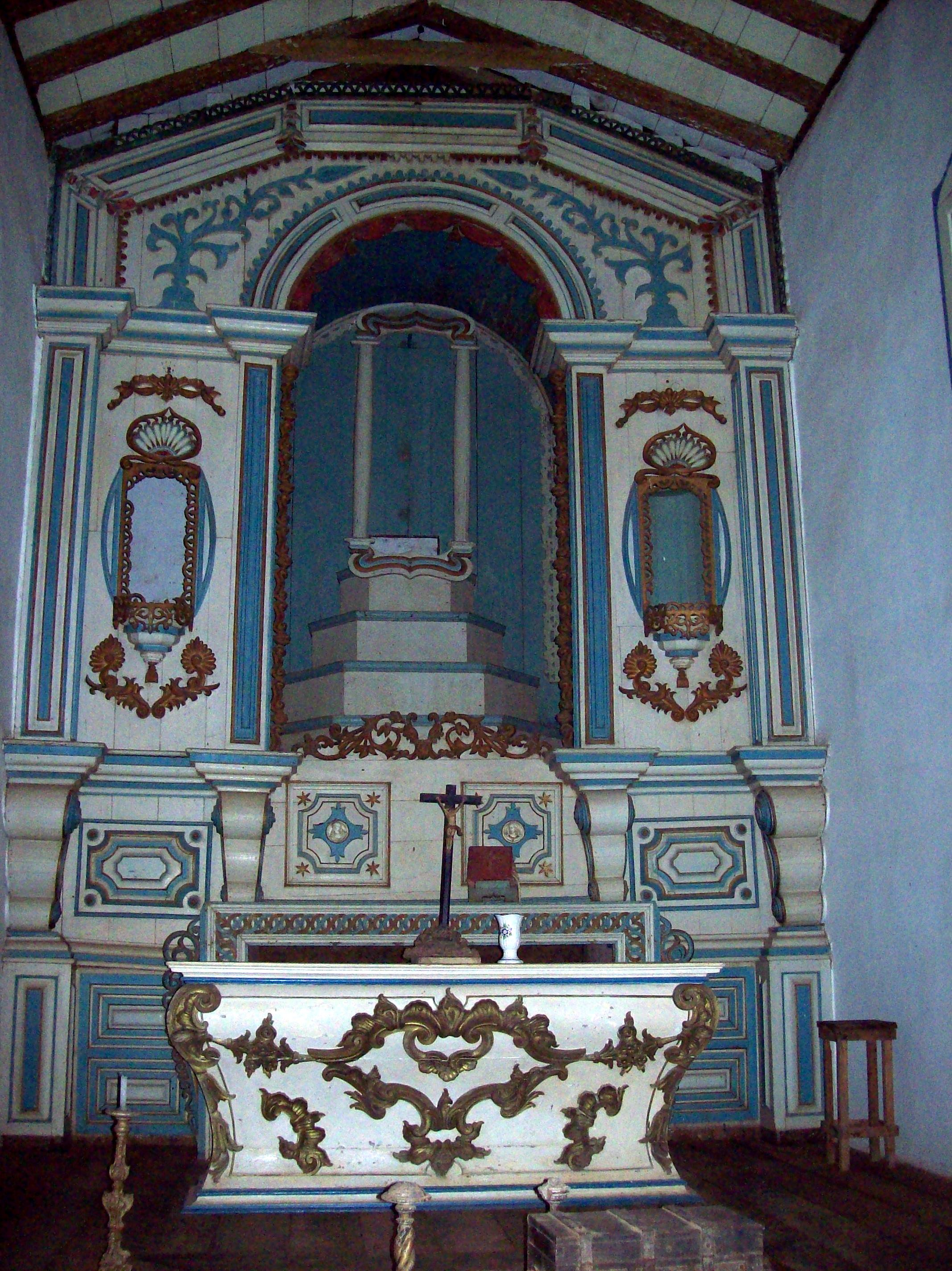 Altar da Igreja do Carmo